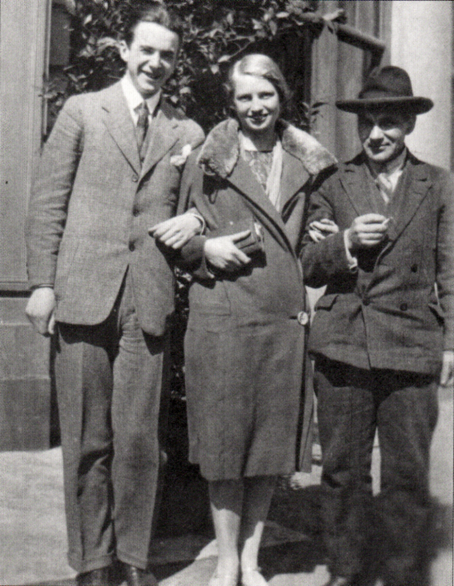 Henry Parland, Gudrun Mörne och Gunnar Björling utanför dansrestaurang Opris sommaren 1928.